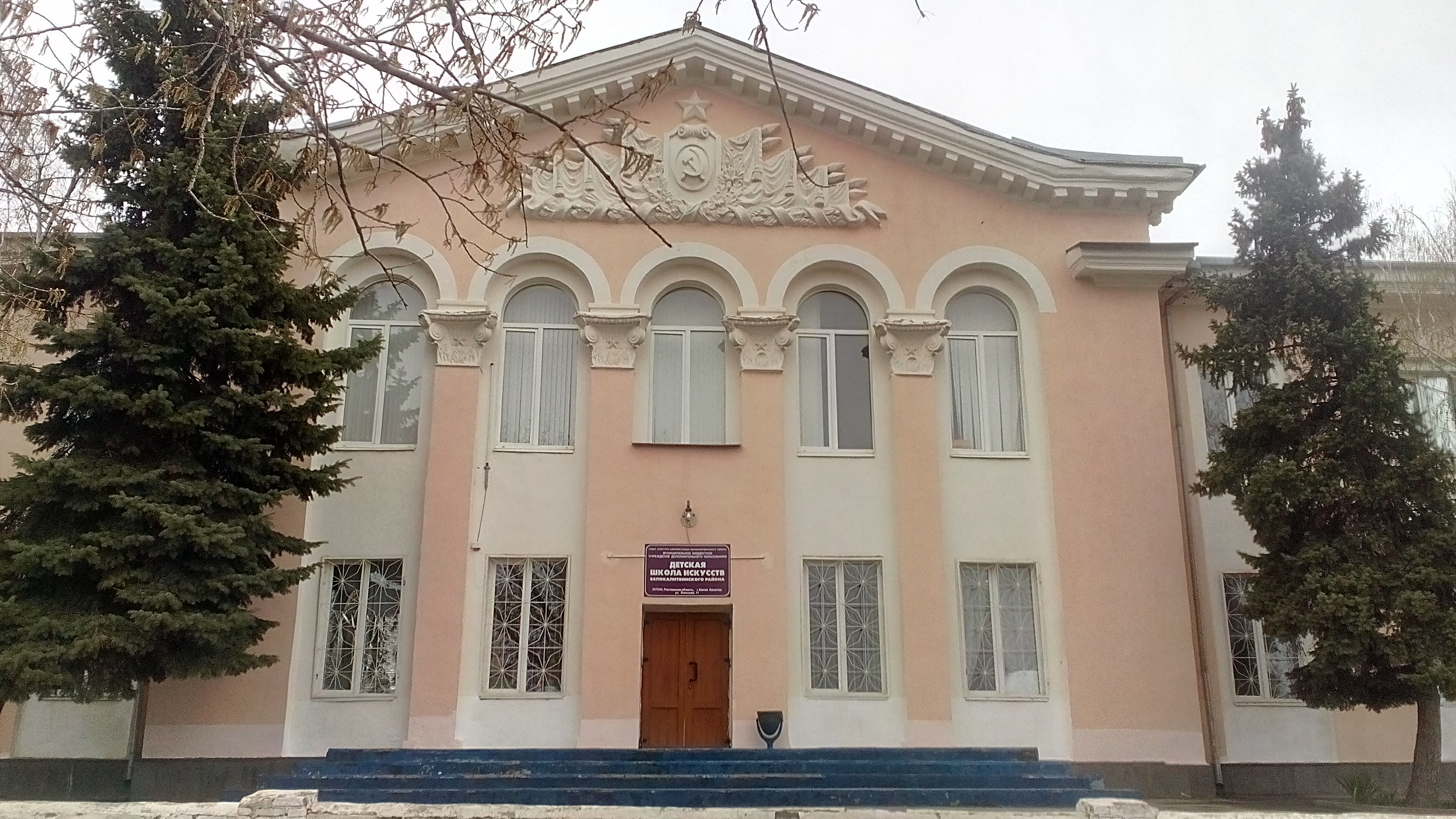 Белая Калитва: здание городской Детской школы искусств